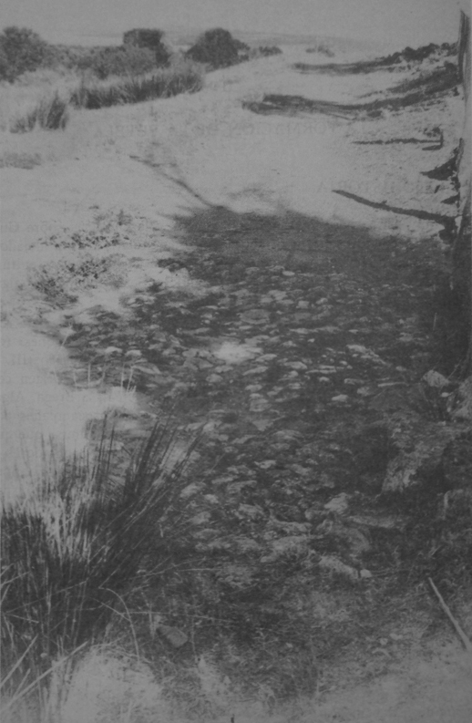 Restos de una posible calzada romana en Guadamur, en el camino real a Toledo, según José María Ruiz Alonso.